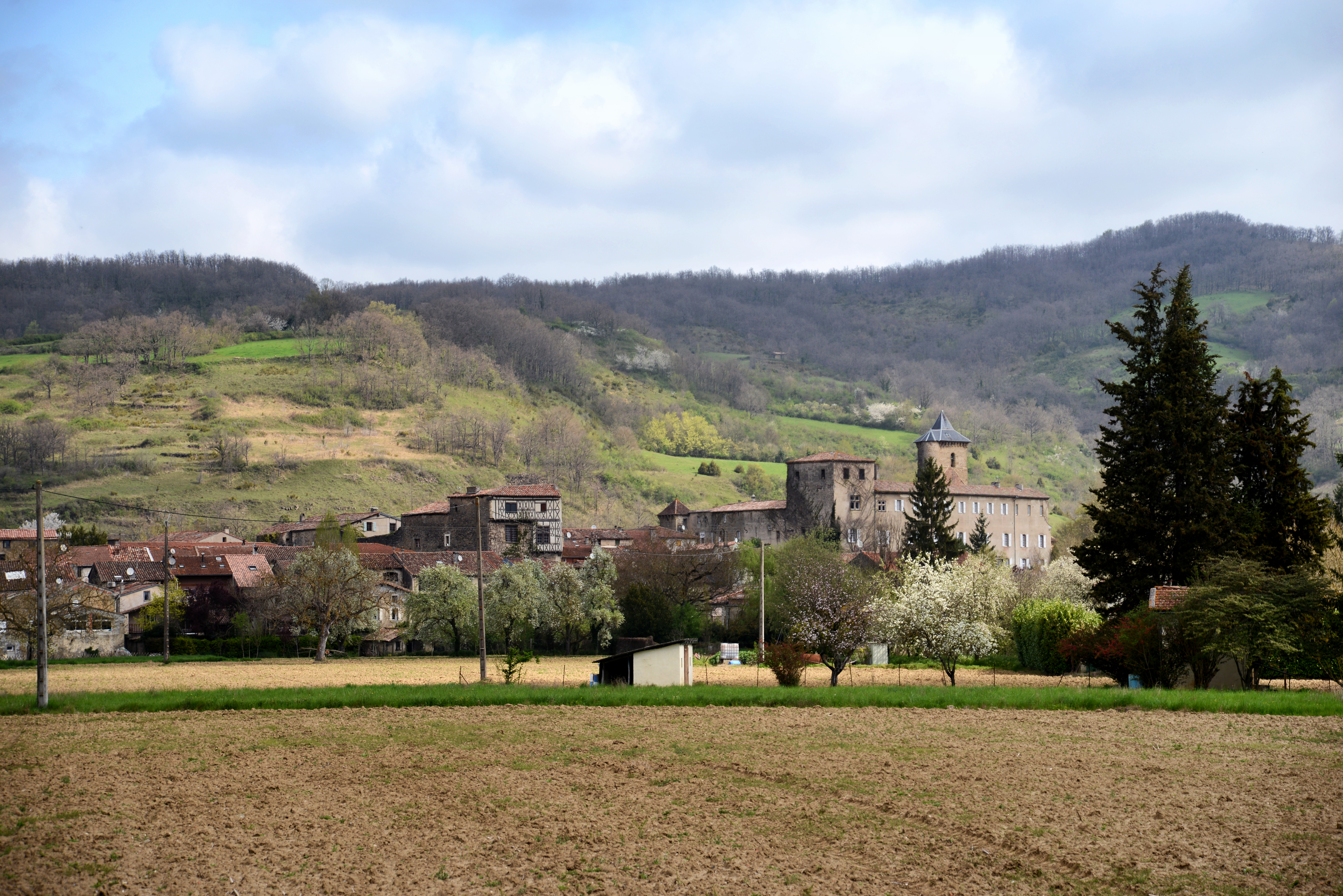 Camon, Ariège (Midi-Pyrénées) - Vue du village